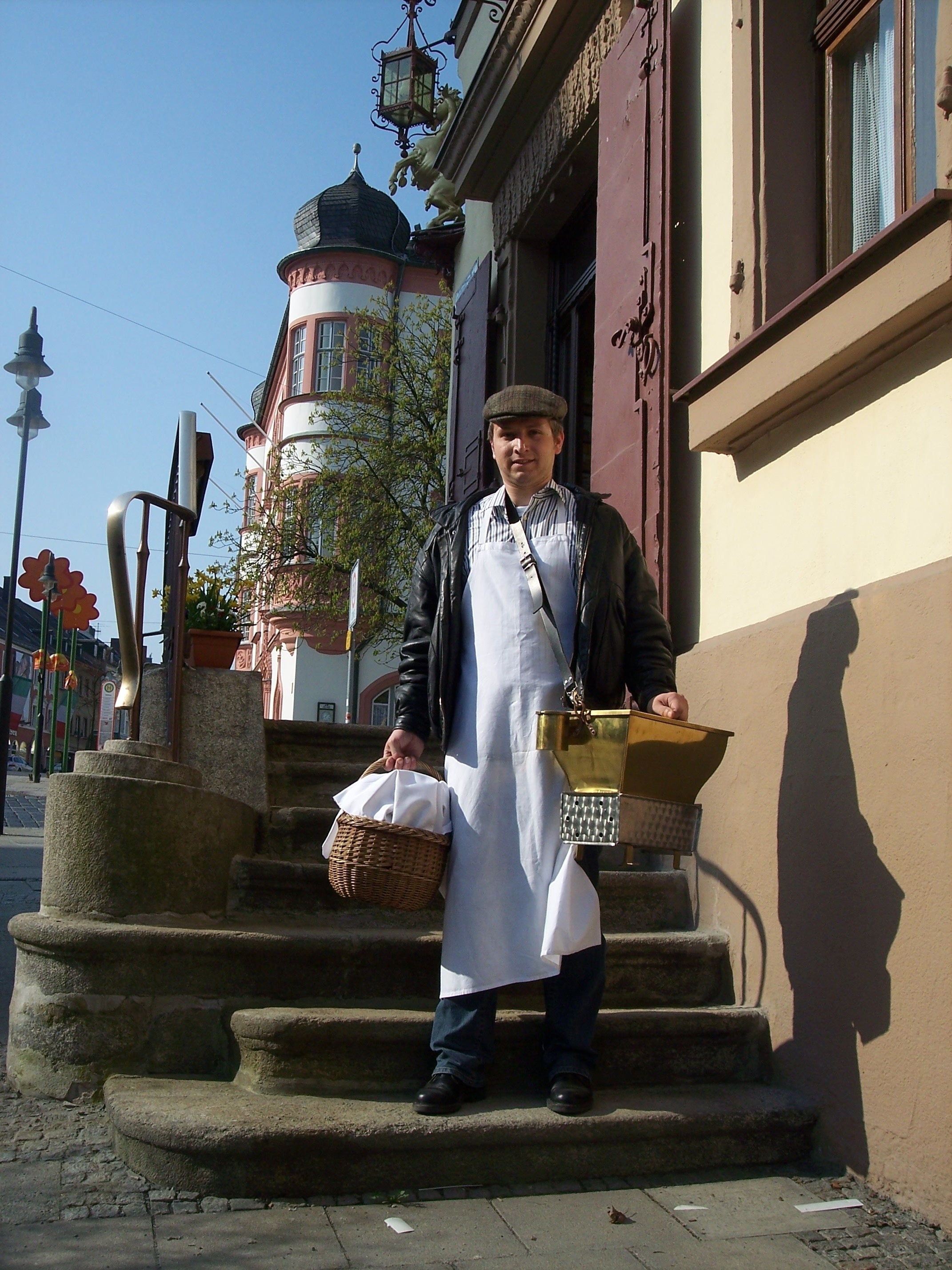 Hofer Wärschlamo - alte Hofer Tradition des "Würstchenmannes".